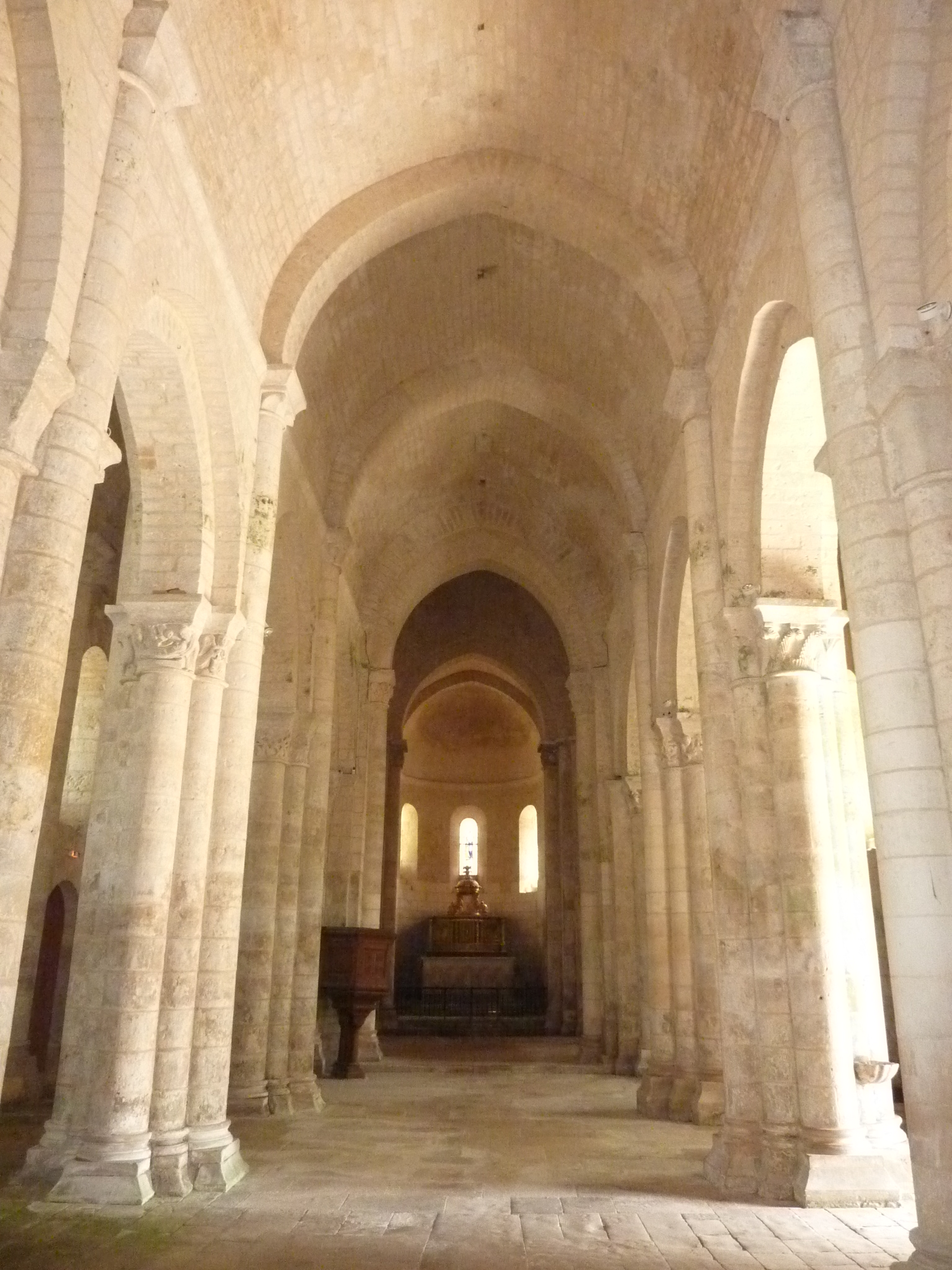 Église Saint-Pierre de Melle